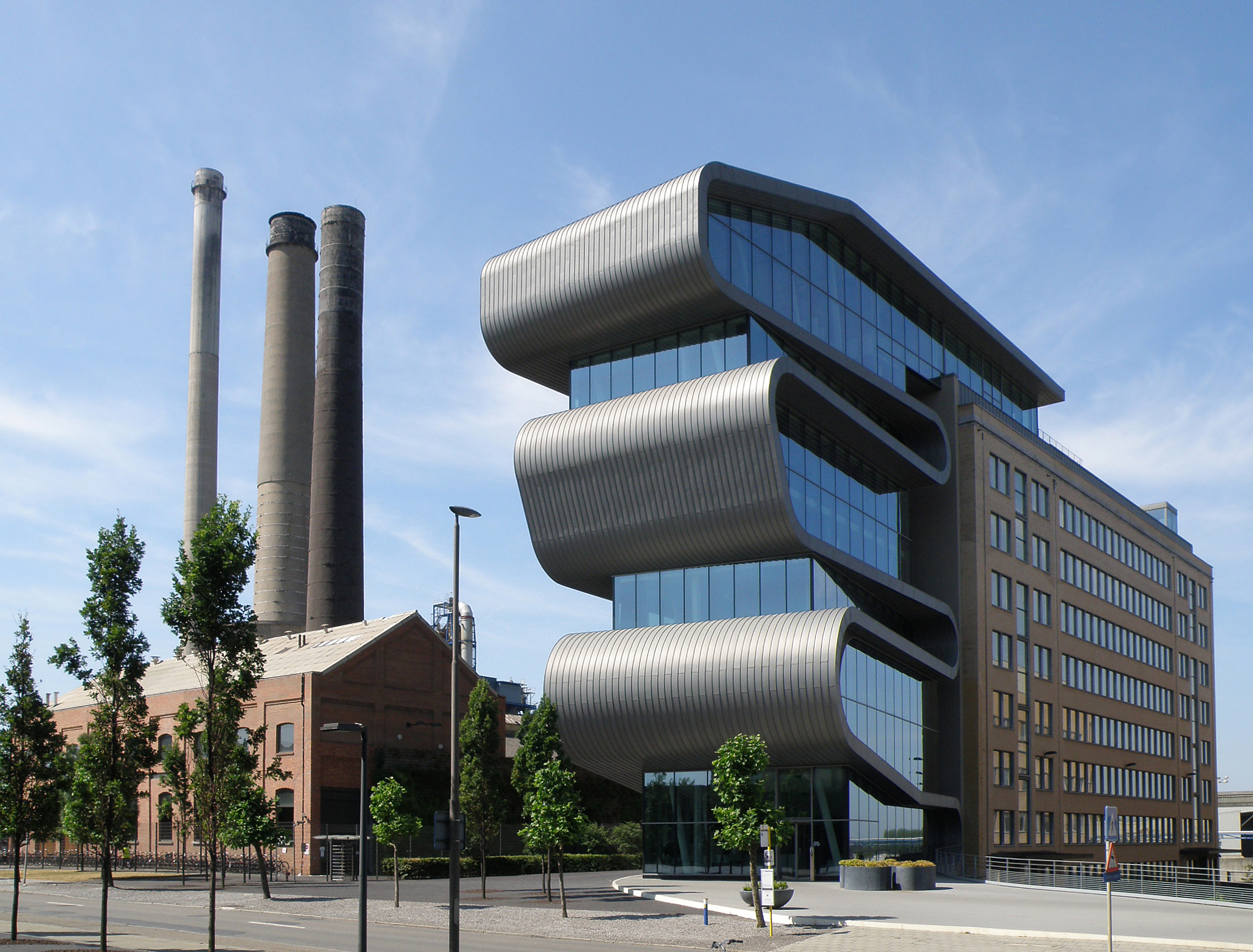 Antwerpen, district Hoboken (België). Umicore-fabrieken, Adolf Greinerstraat.